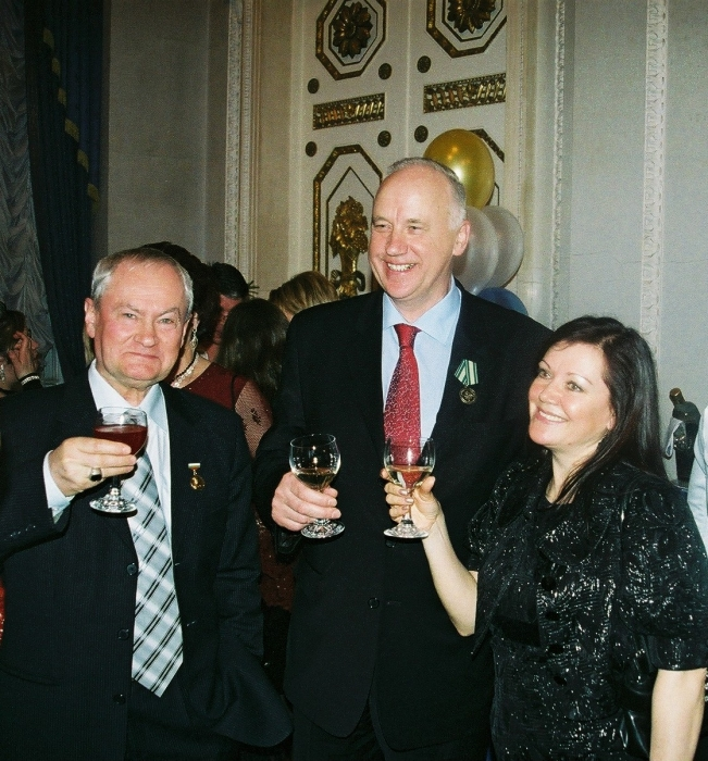 Профессоры Каратаев Олег Гурьевич, Бастрыкин Александр Иванович.